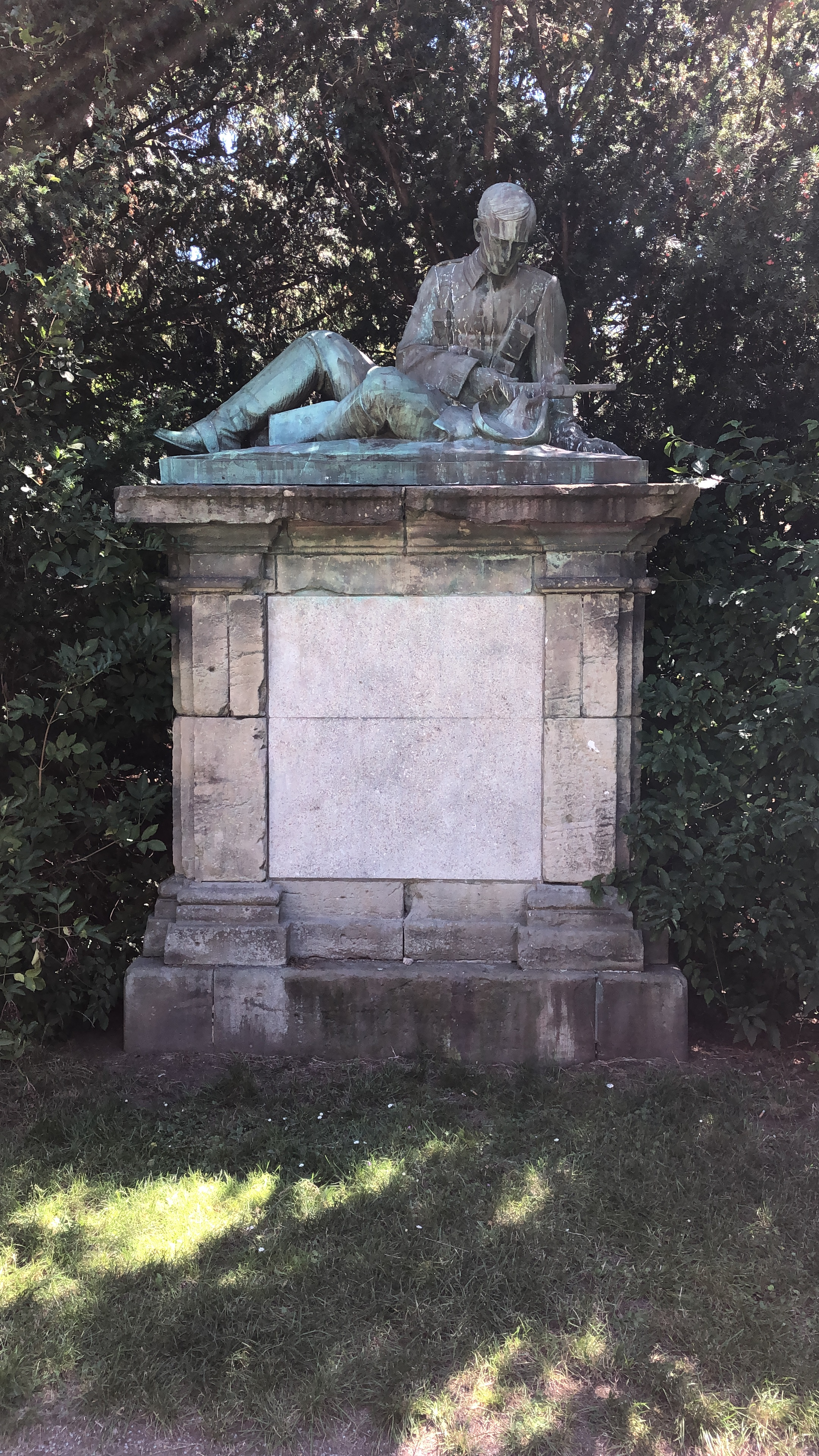 Kolonialkriegerdenkmal in Düsseldorf-Derendorf, Ansicht